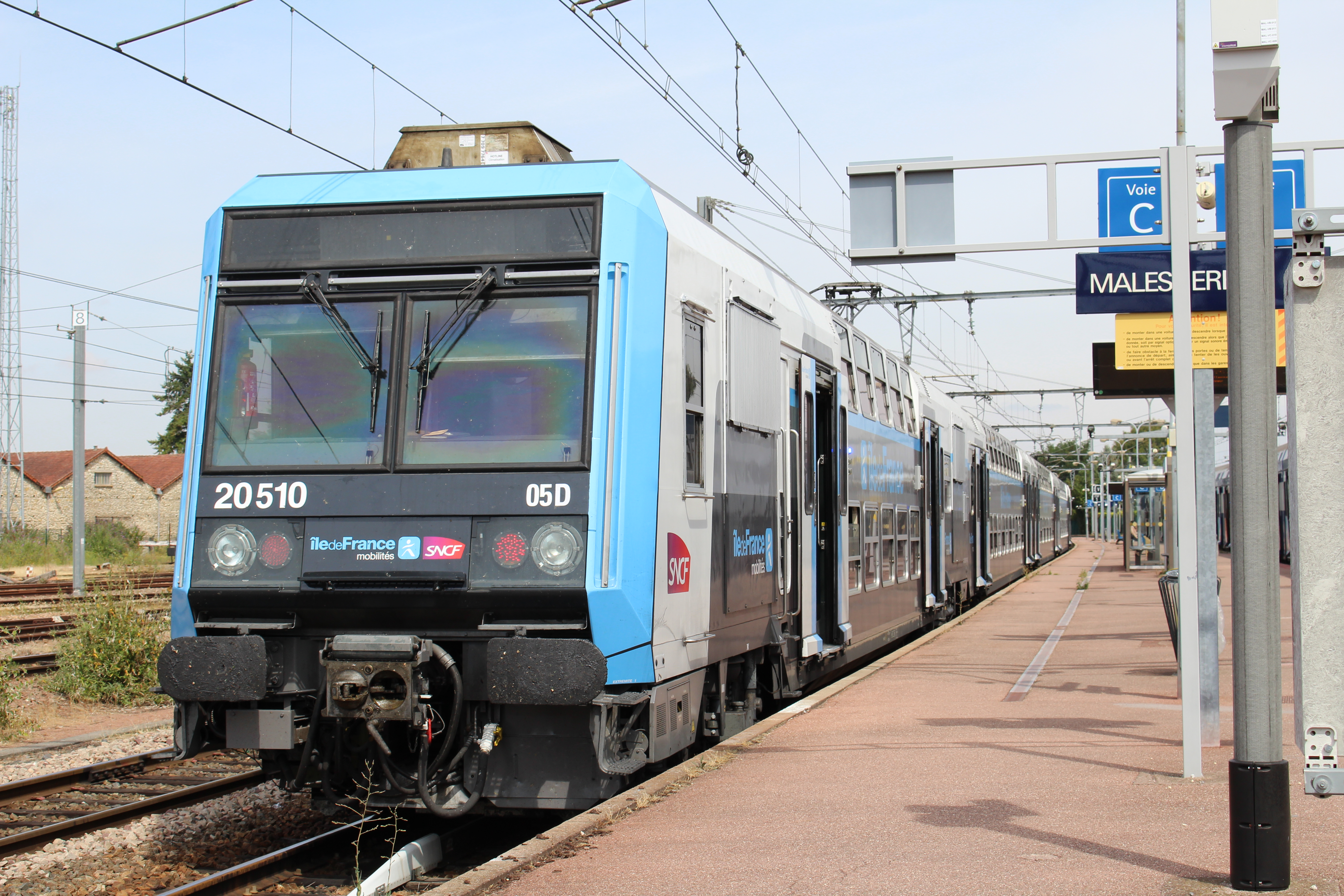 Gare de Malesherbes, Le Malesherbois.